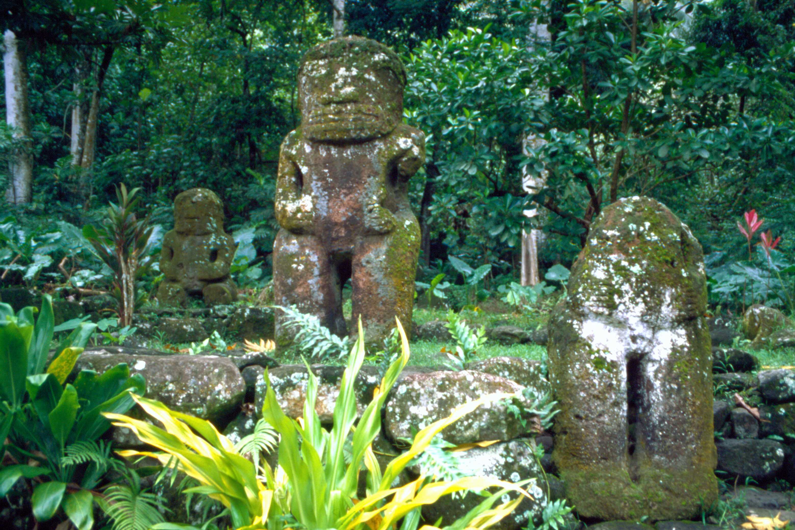 Marea mit Steinstatuen (Tikis) auf Hiva Oa, Marquesas, Französisch-Polynesien